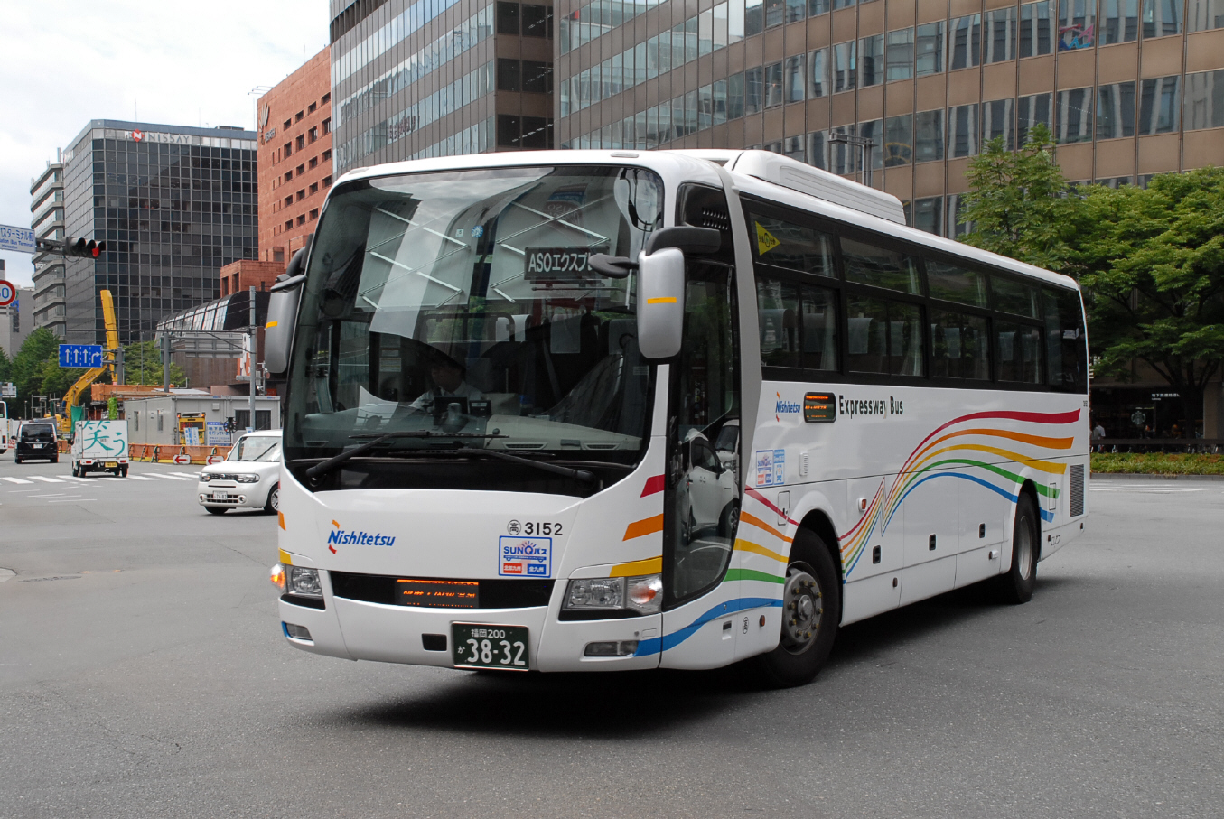 博多駅バスターミナル入口にて撮影